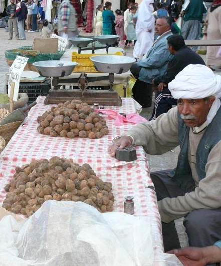 Terfesse, truffe blanche d'Afrique du Nord, dite Belhourech